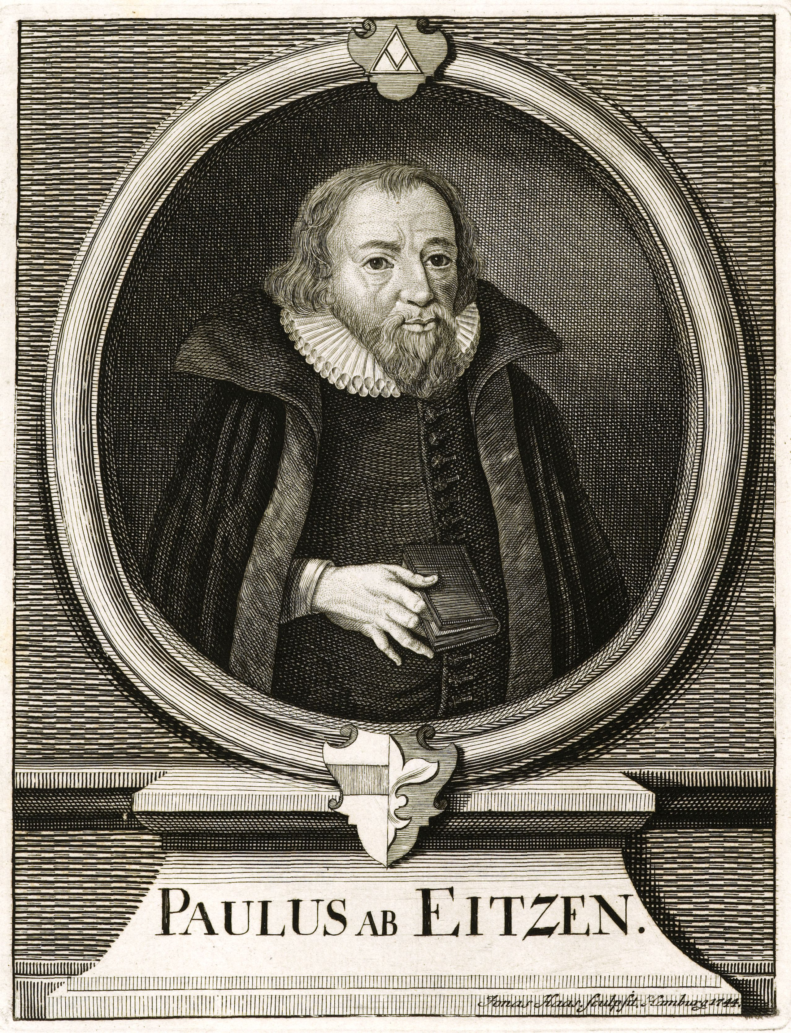 Paulus ab Eitzen